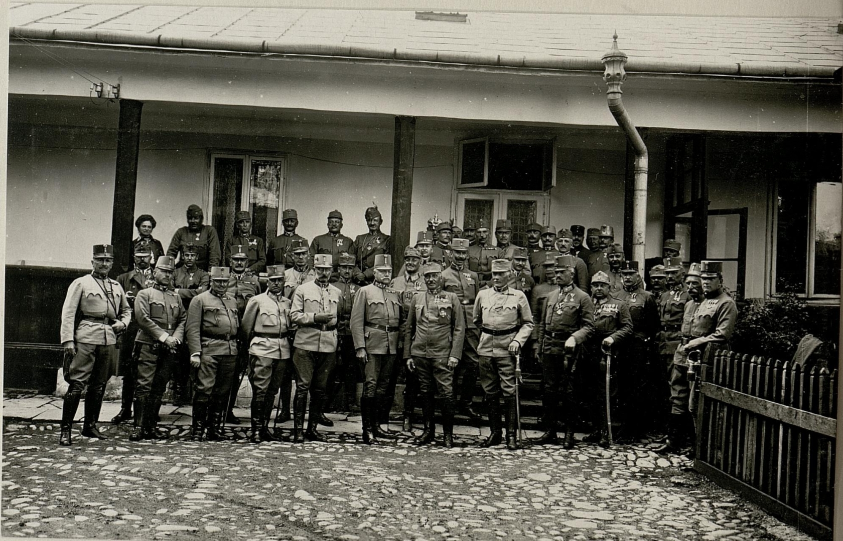 Ernennung Sr.Ex.Planzer Baltin zum Generalstabsoberst